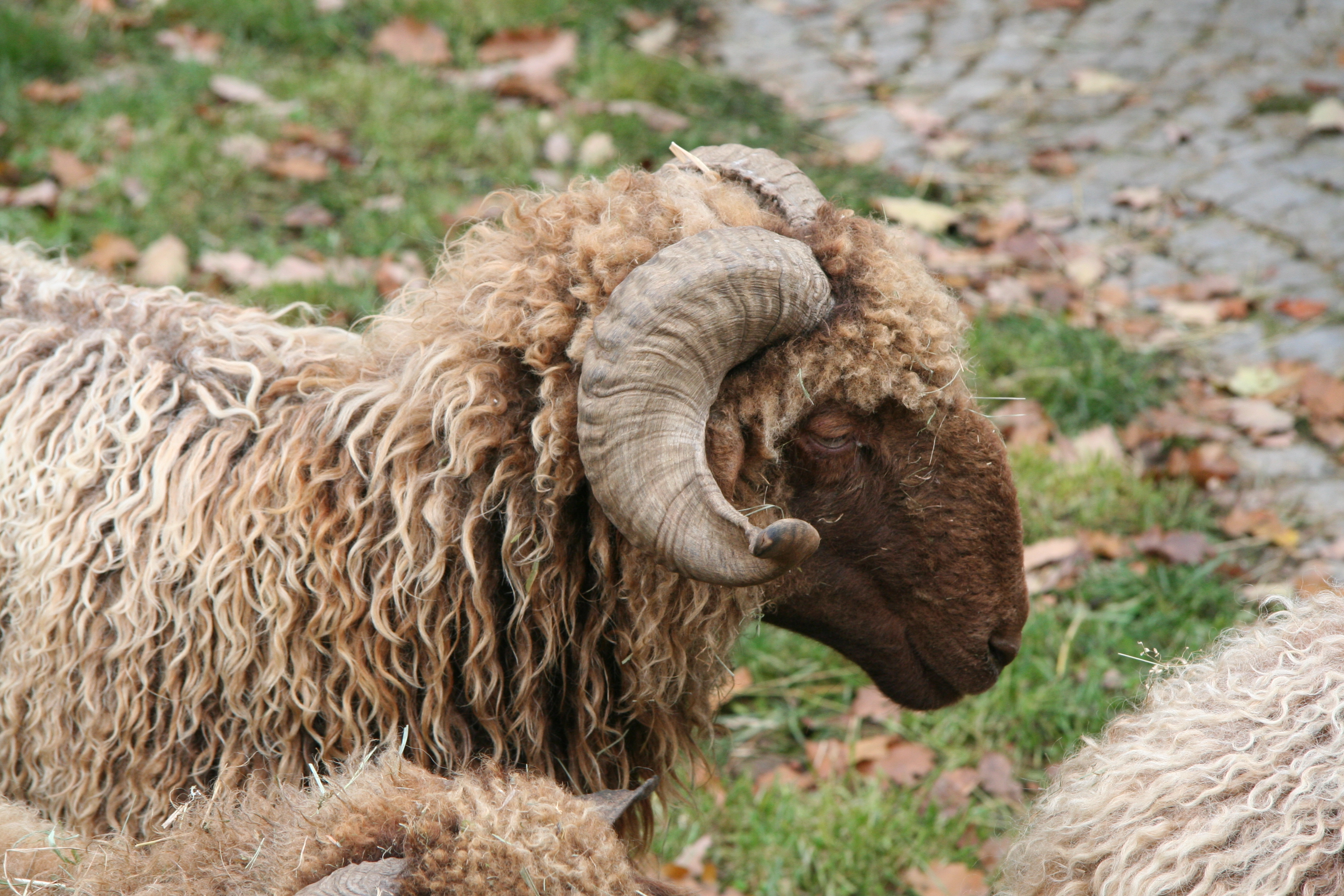 Mouton Roux du Valais